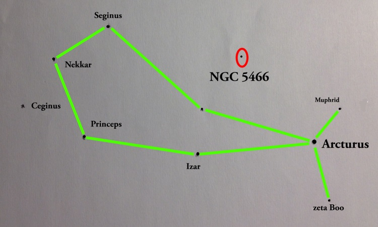 constellation Bouvier et amas NGC 5466